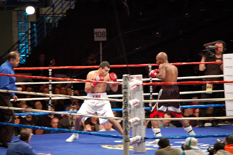 Vanes Martirosyan boxer.